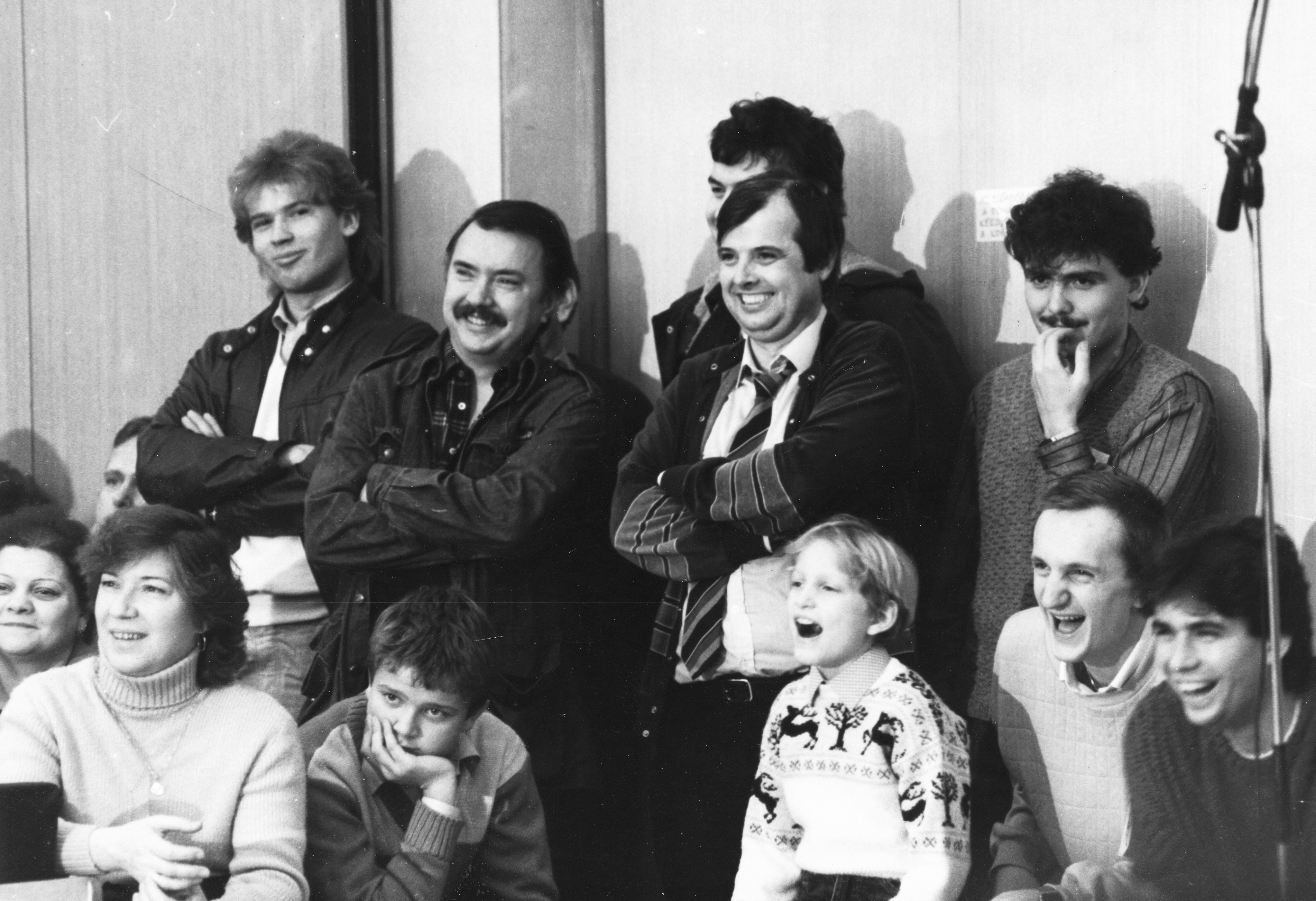 Rádiószilveszter, középen Farkasházy Tivadar (bajusszal) és Sinkó Péter (nyakkendőben) szerkesztők. Location: Hungary, Budapest Title: Rádiószilveszter, középen Farkasházy Tivadar (bajusszal) és Sinkó Péter (nyakkendőben) szerkesztők.